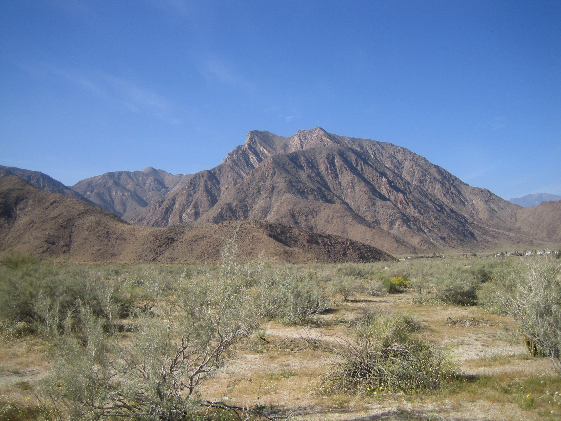 Ansicht Anza-Borrego State Park in Kalifornien